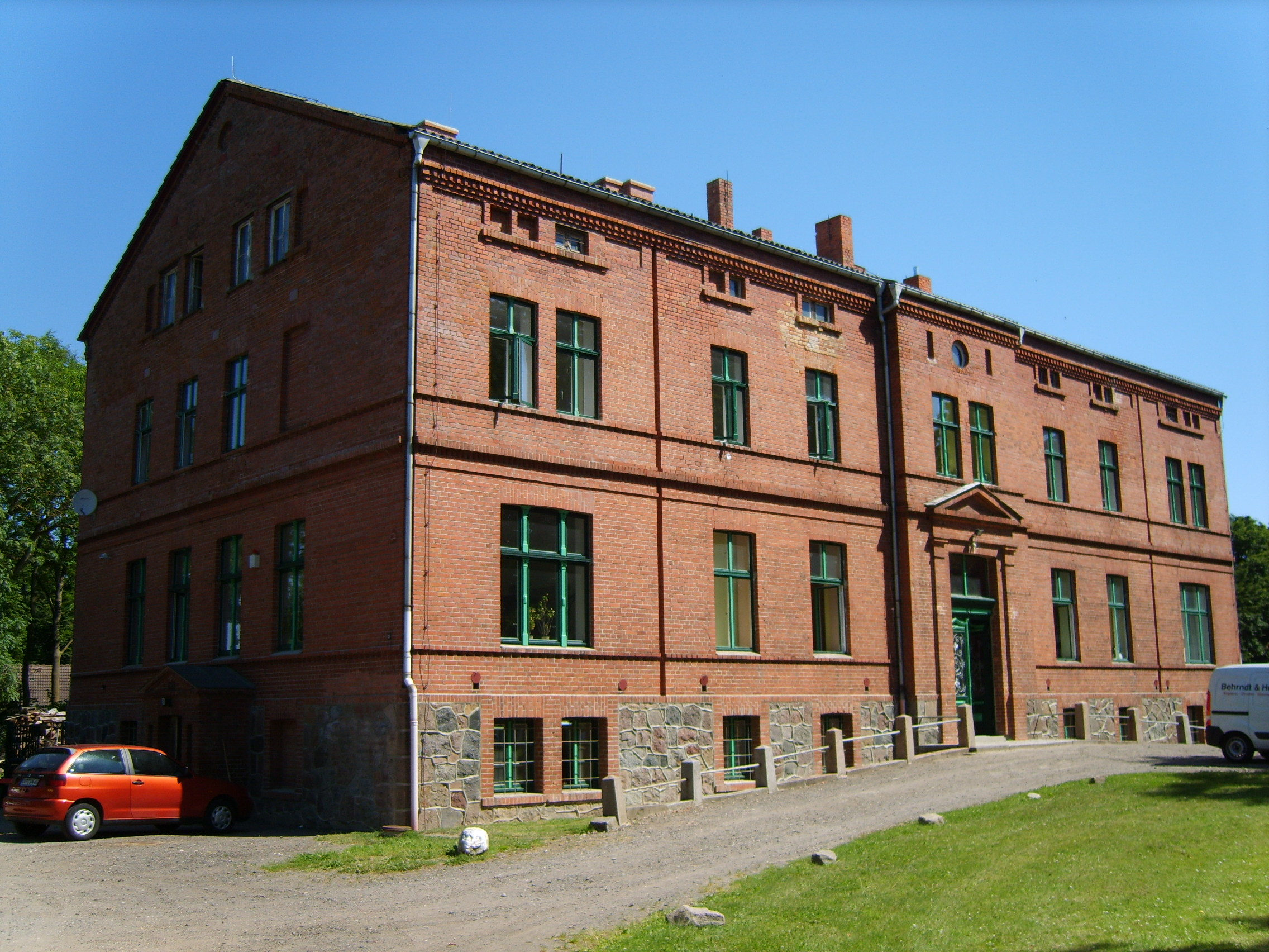 Gutshaus Gribow von 1888